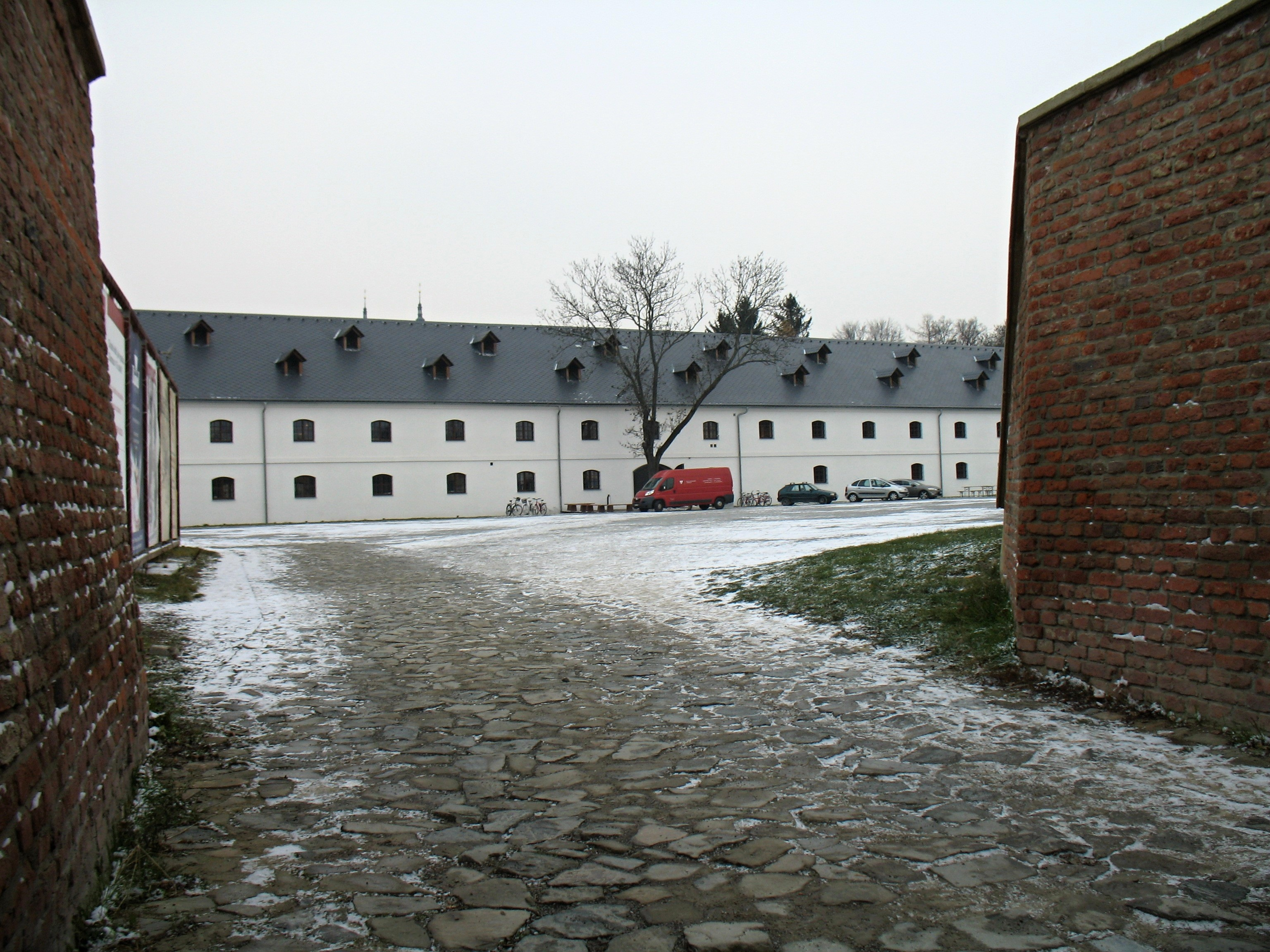 Areál korunní pevnůstky Olomouc. Vstup do areálu